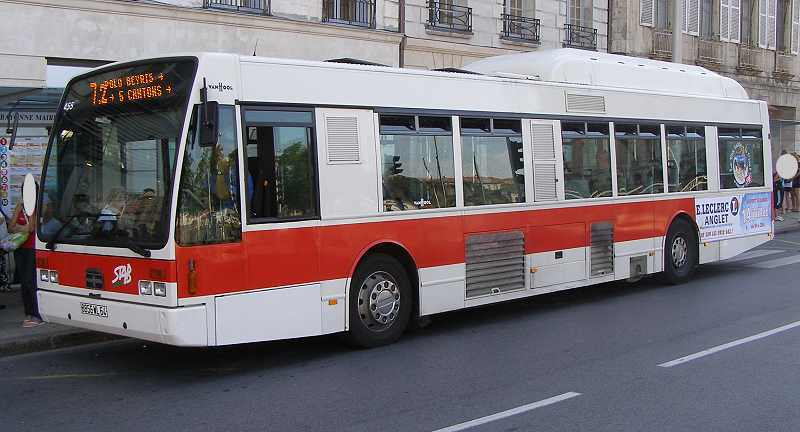 Photo d'un bus sur la ligne 7.2 du réseau Stab à Bayonne